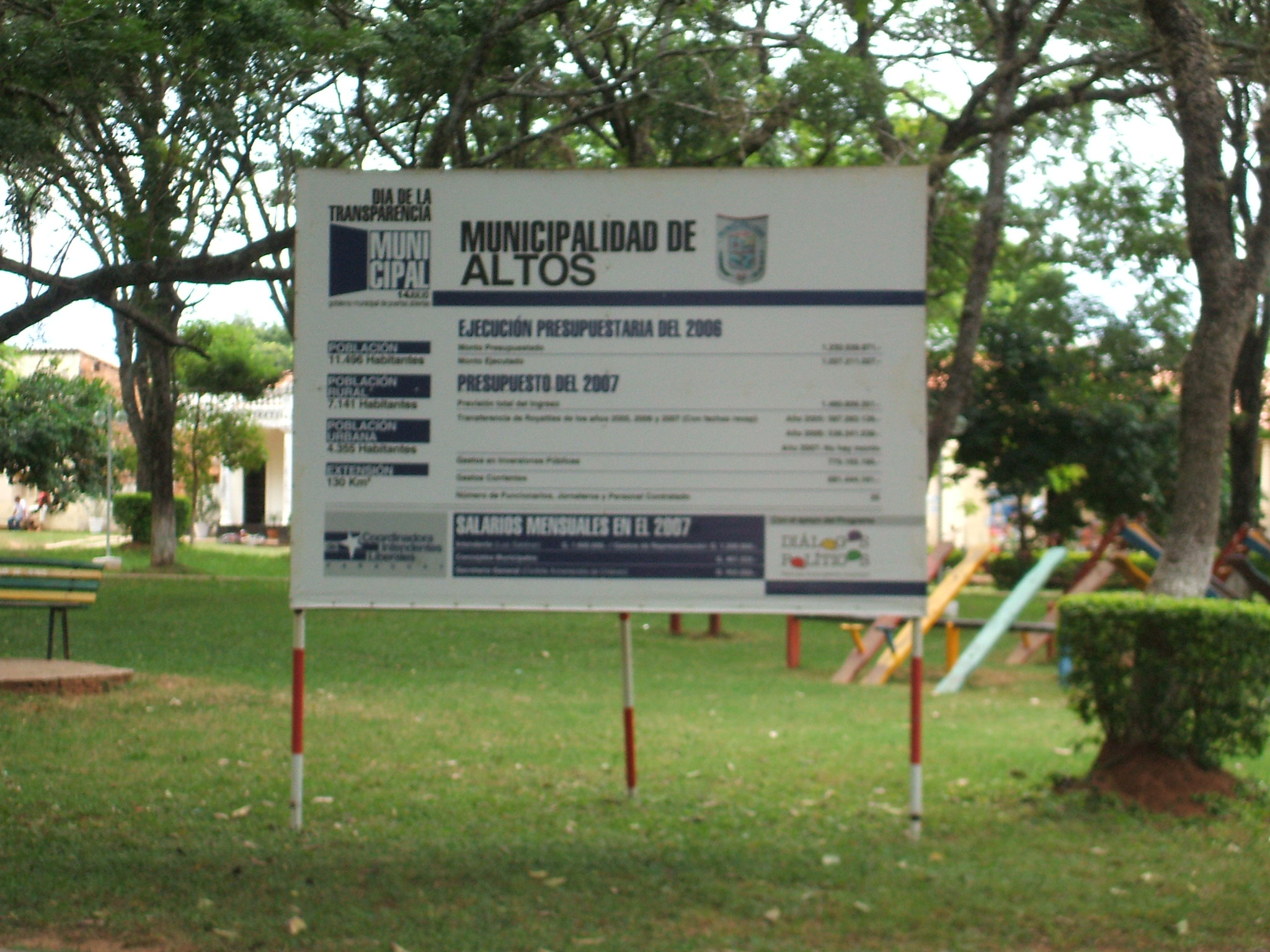 Plaza